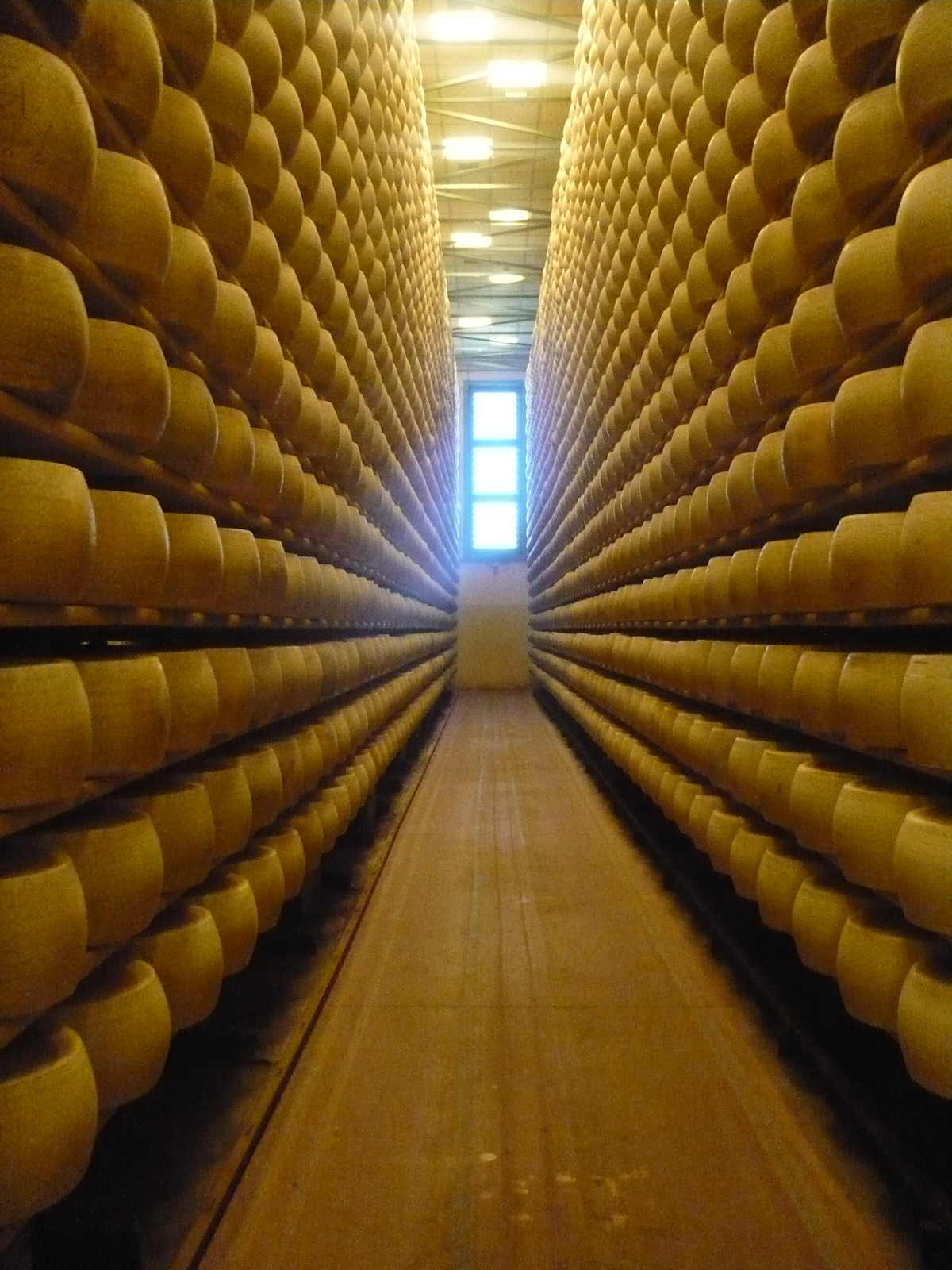 Grana Padano cheese